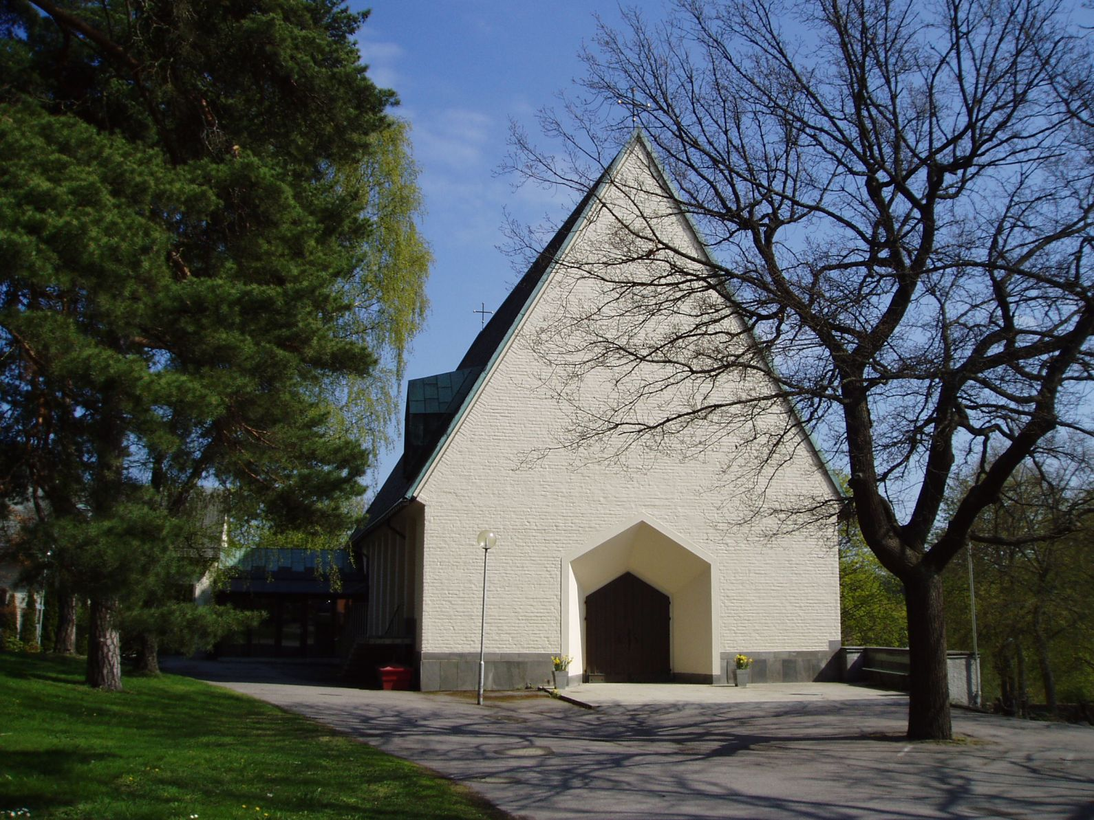 Ängby kyrka, church in Bromma, Stockholm, Sweden